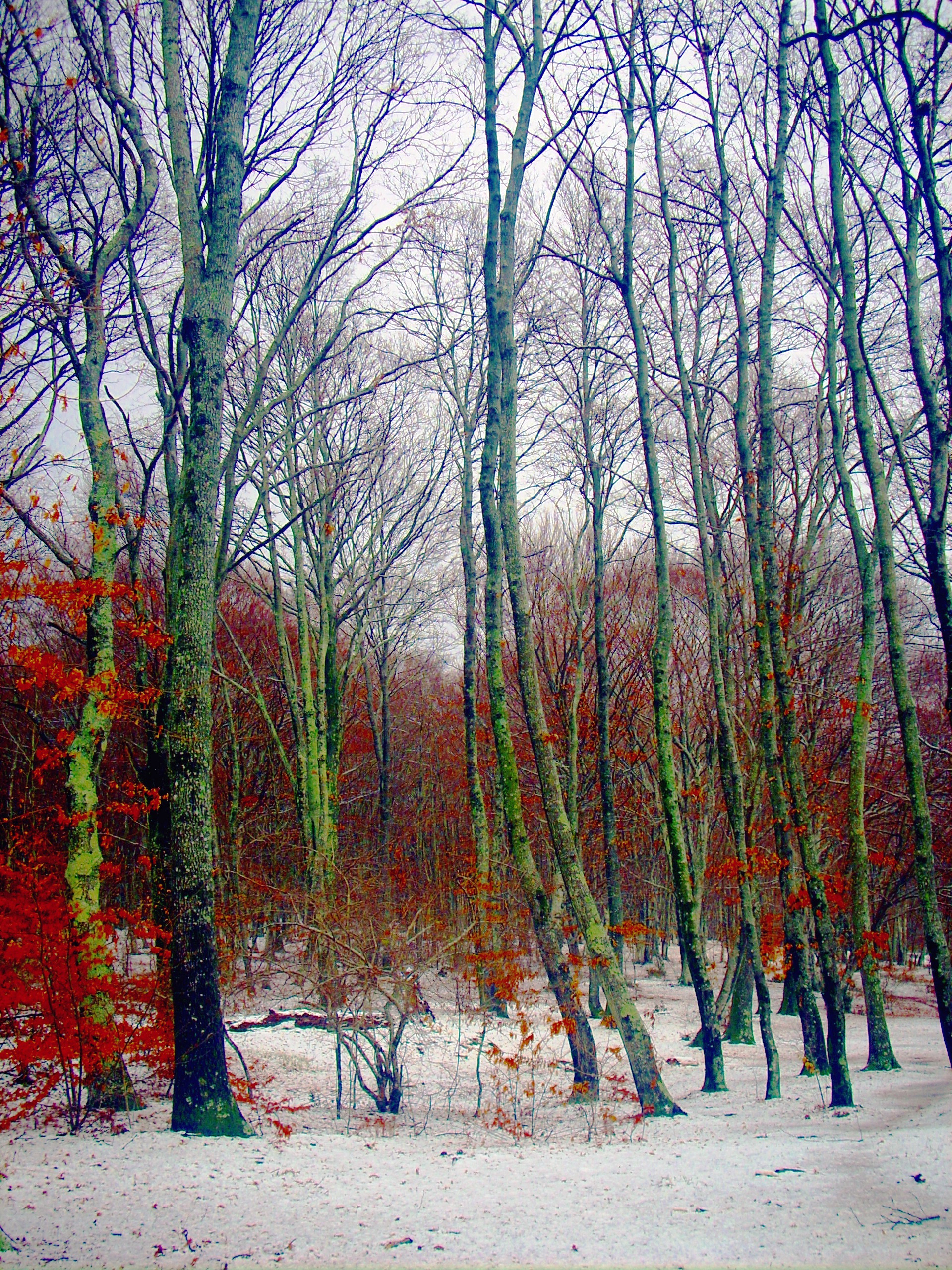 Faggeta vetusta depressa monte Raschio nevicata 30 dicembre 2011